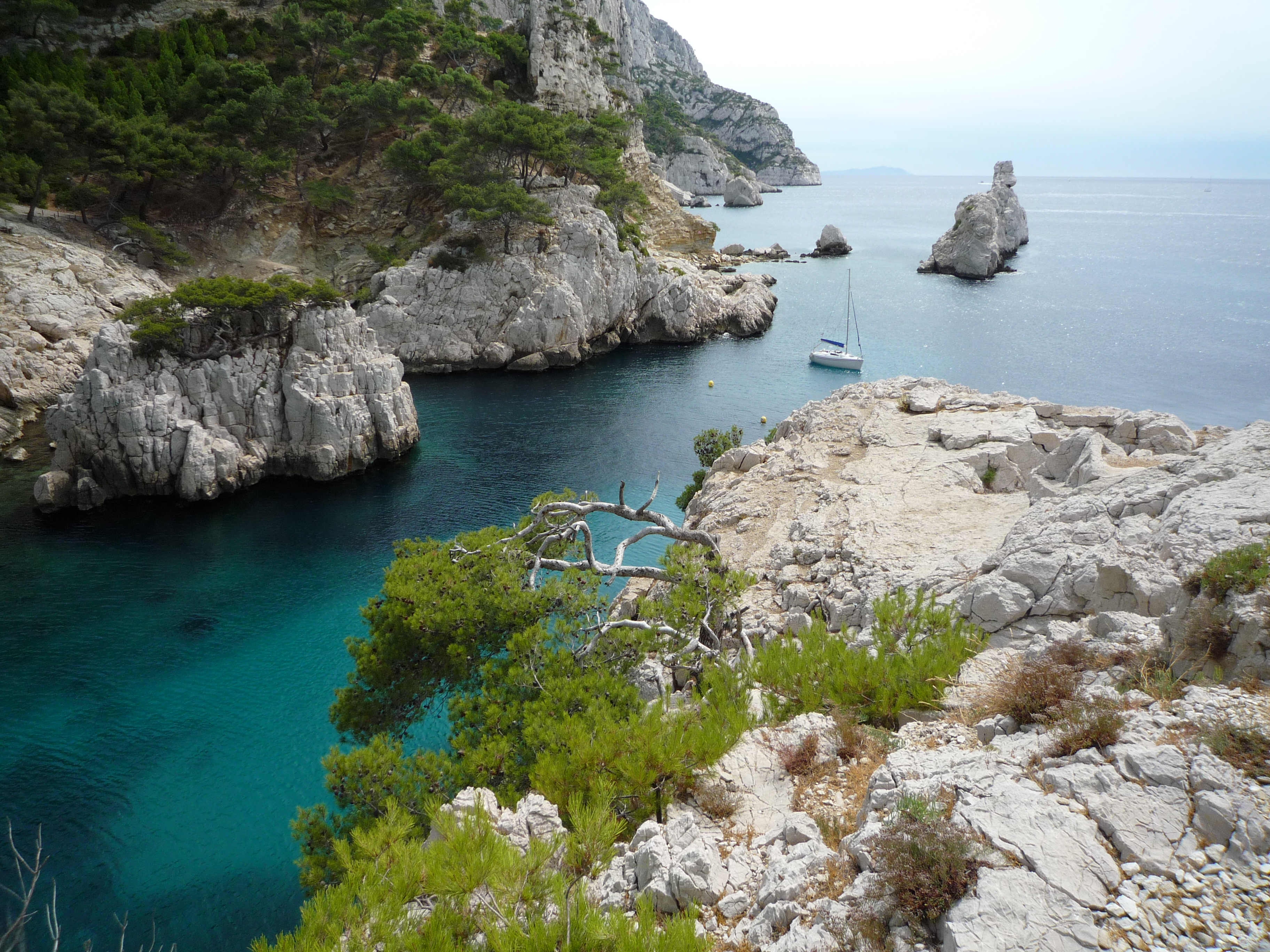 Sugiton